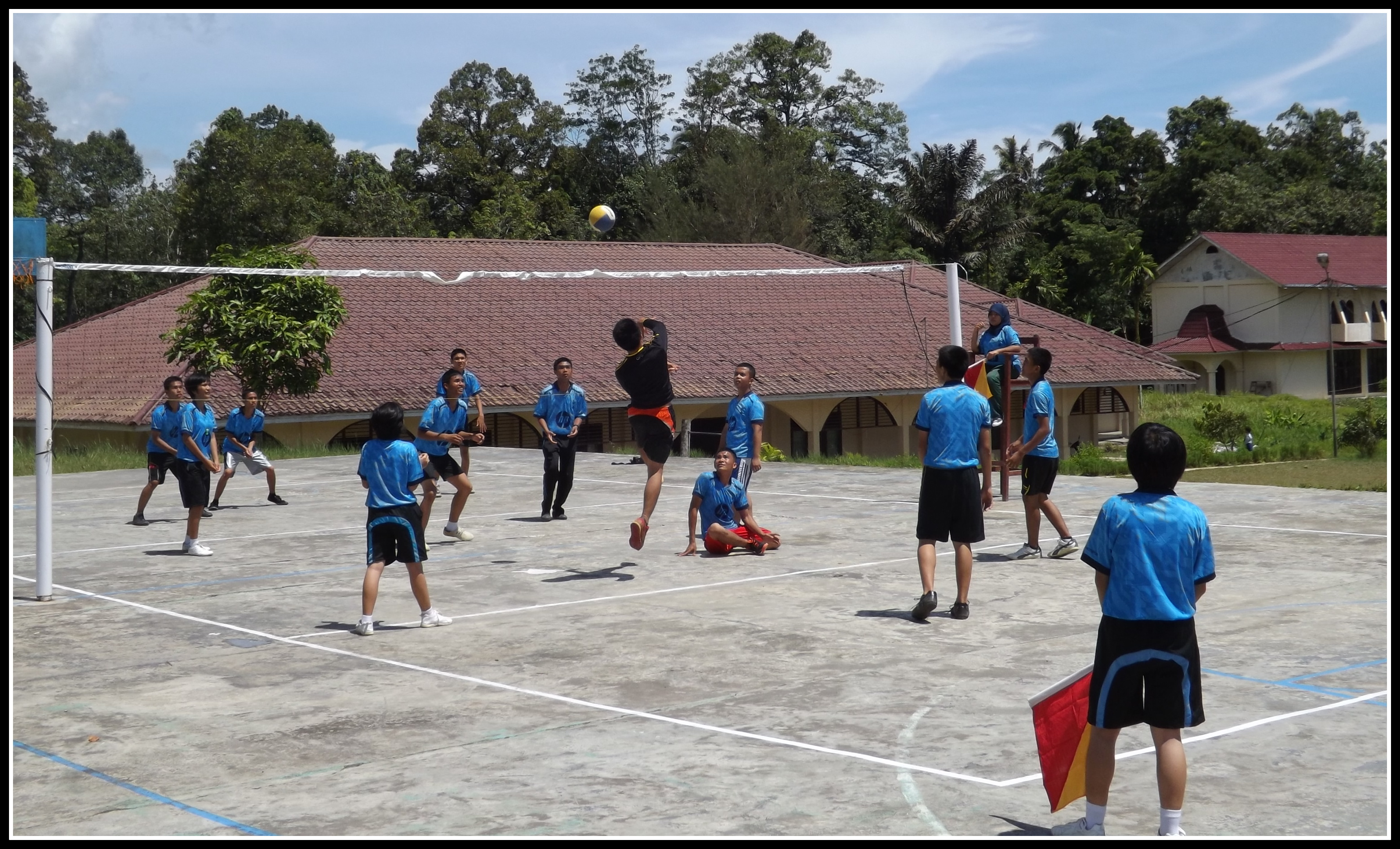 Fasilitas Olahraga